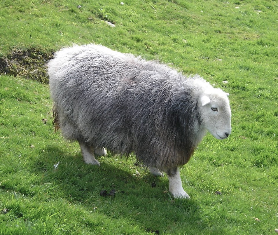 A Herdwick ewe.